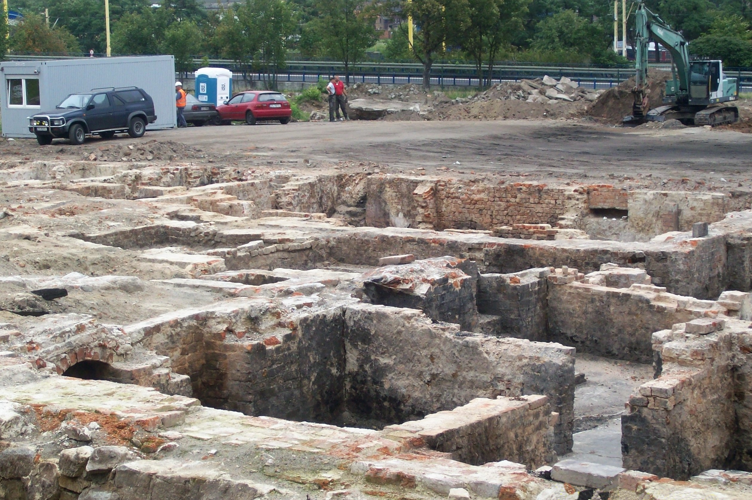 Wykopaliska na starym mieście w Szczecinie